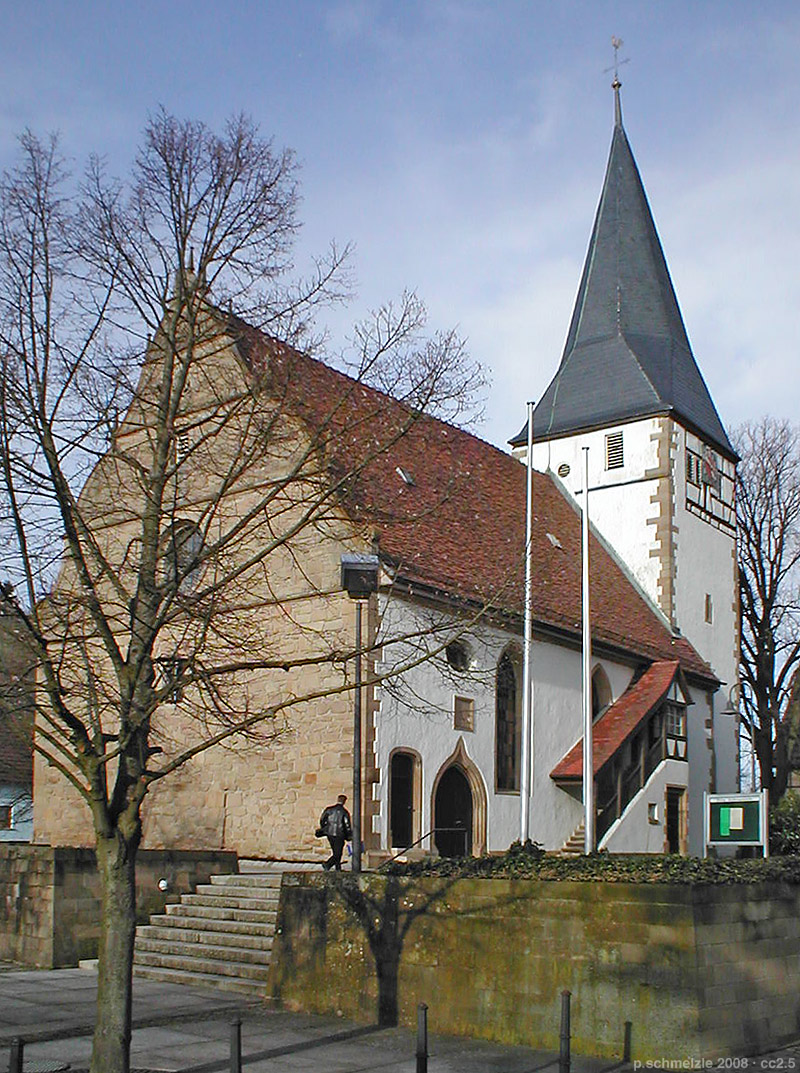 Evangelische Lambertuskirche in Pfaffenhofen (Württ.)